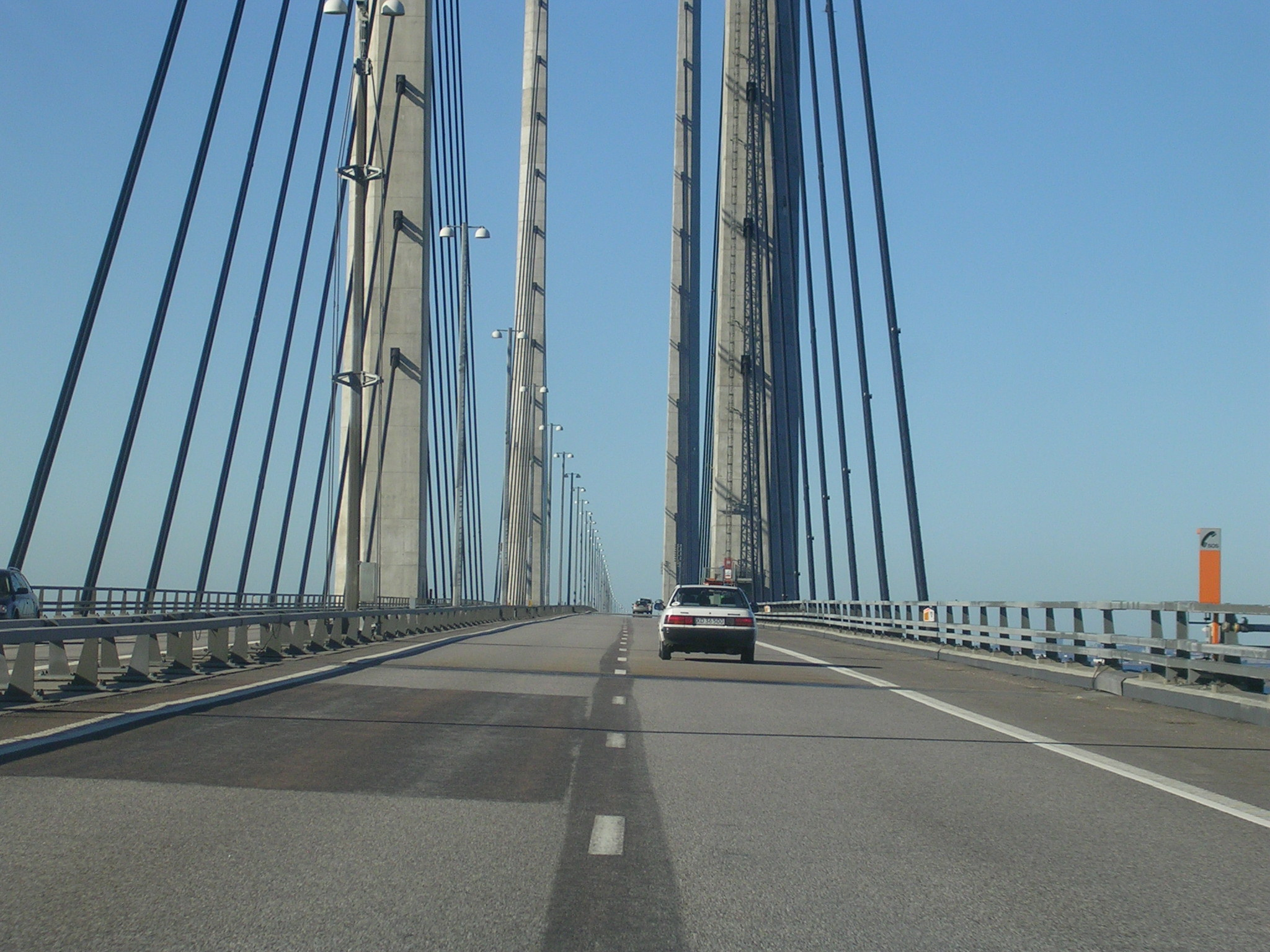 Øresund bridge Author: Väsk